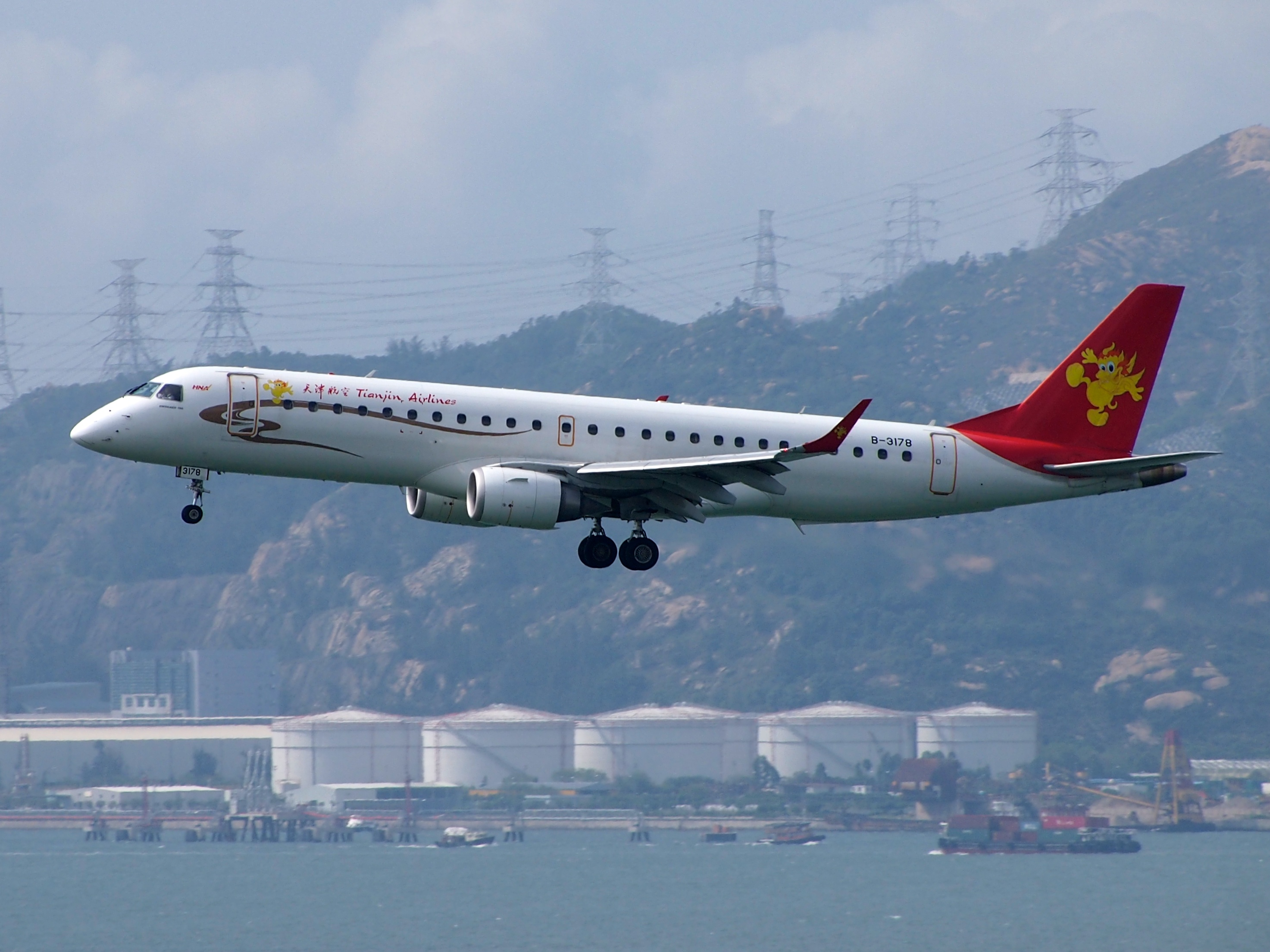 B-3178